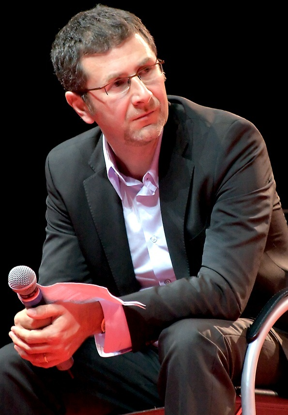 Fabio Fazio, 10 Settembre 2010, Mandela Forum, 9° Incontro nazionale di Emergency, Firenze